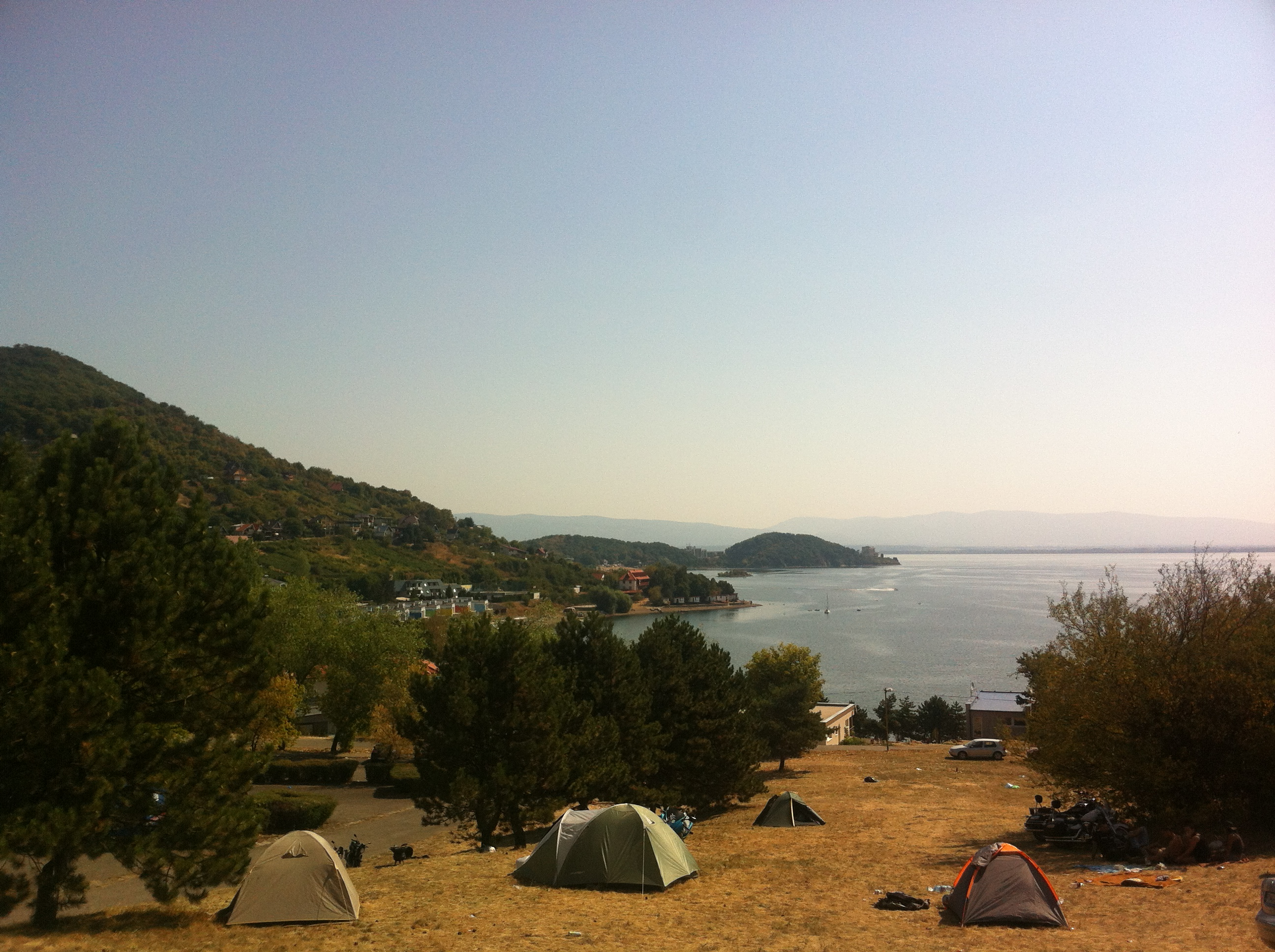 Zemplínska šírava 2013, Slovakia